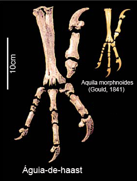 Águia-de-haast, presente no artigo científico intitulado: Ancient DNA Provides New Insights into the Evolutionary History of New Zealand's Extinct Giant Eagle